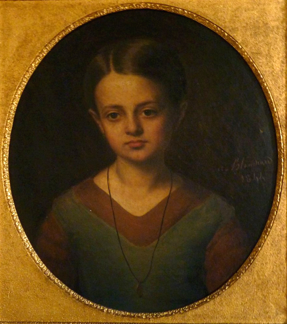 Benoite Blanchard, peinte en 1844 par son père André Blanchard. Collection personnelle